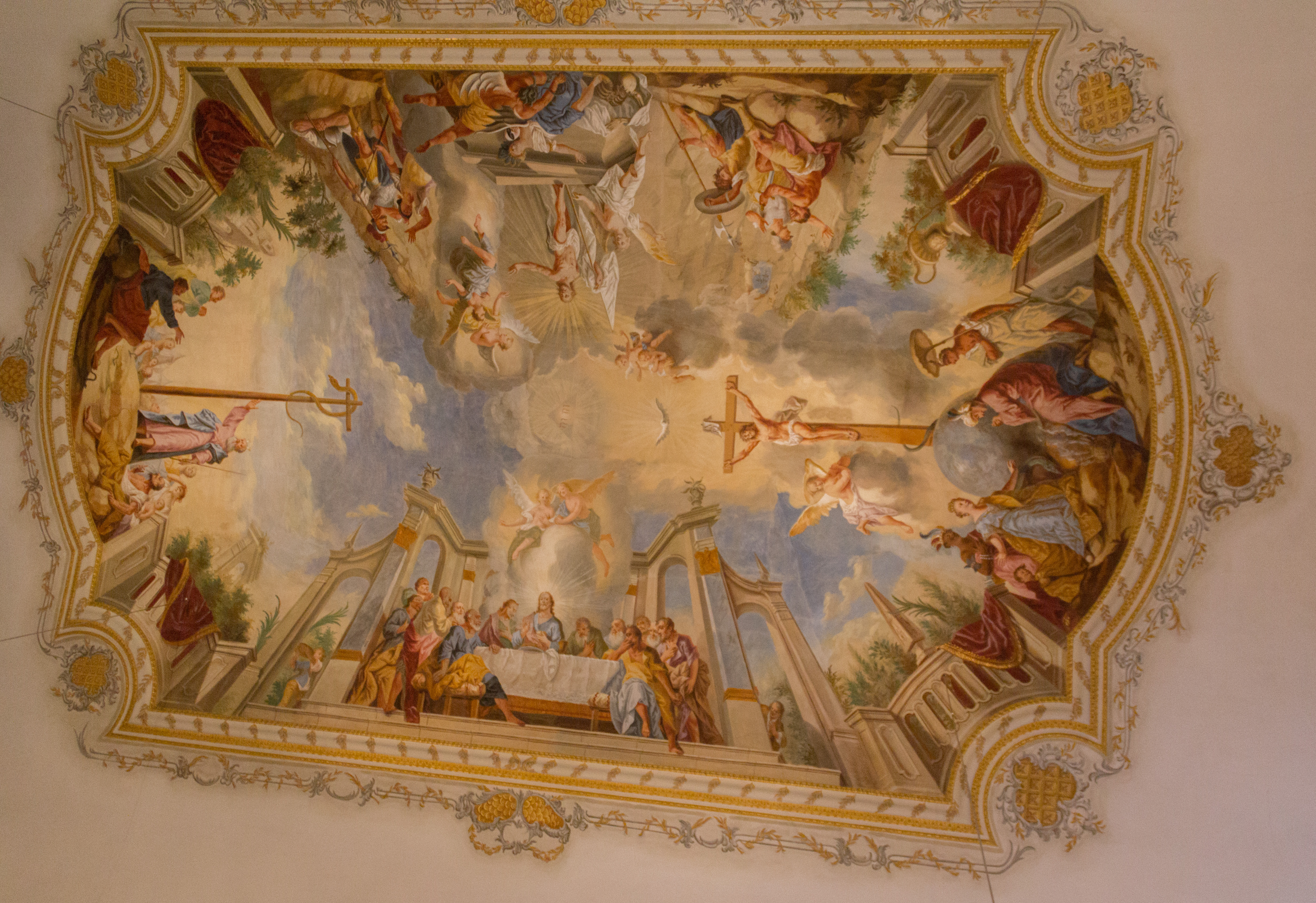 Dinkelsbühl, Wikipedia Treffen Süddeutschland 2018